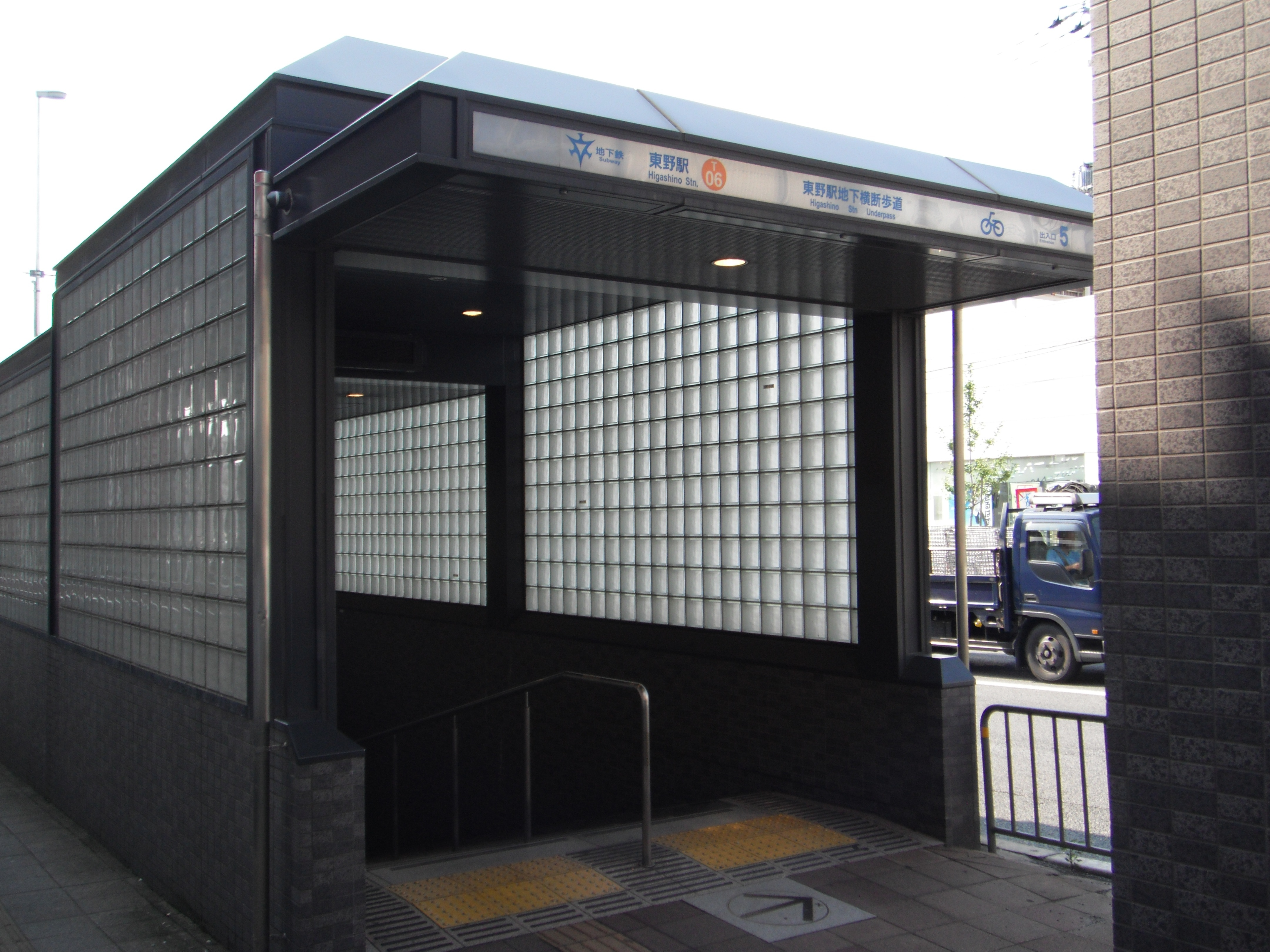 京都市営地下鉄東西線東野駅5番出入口（京都市山科区）